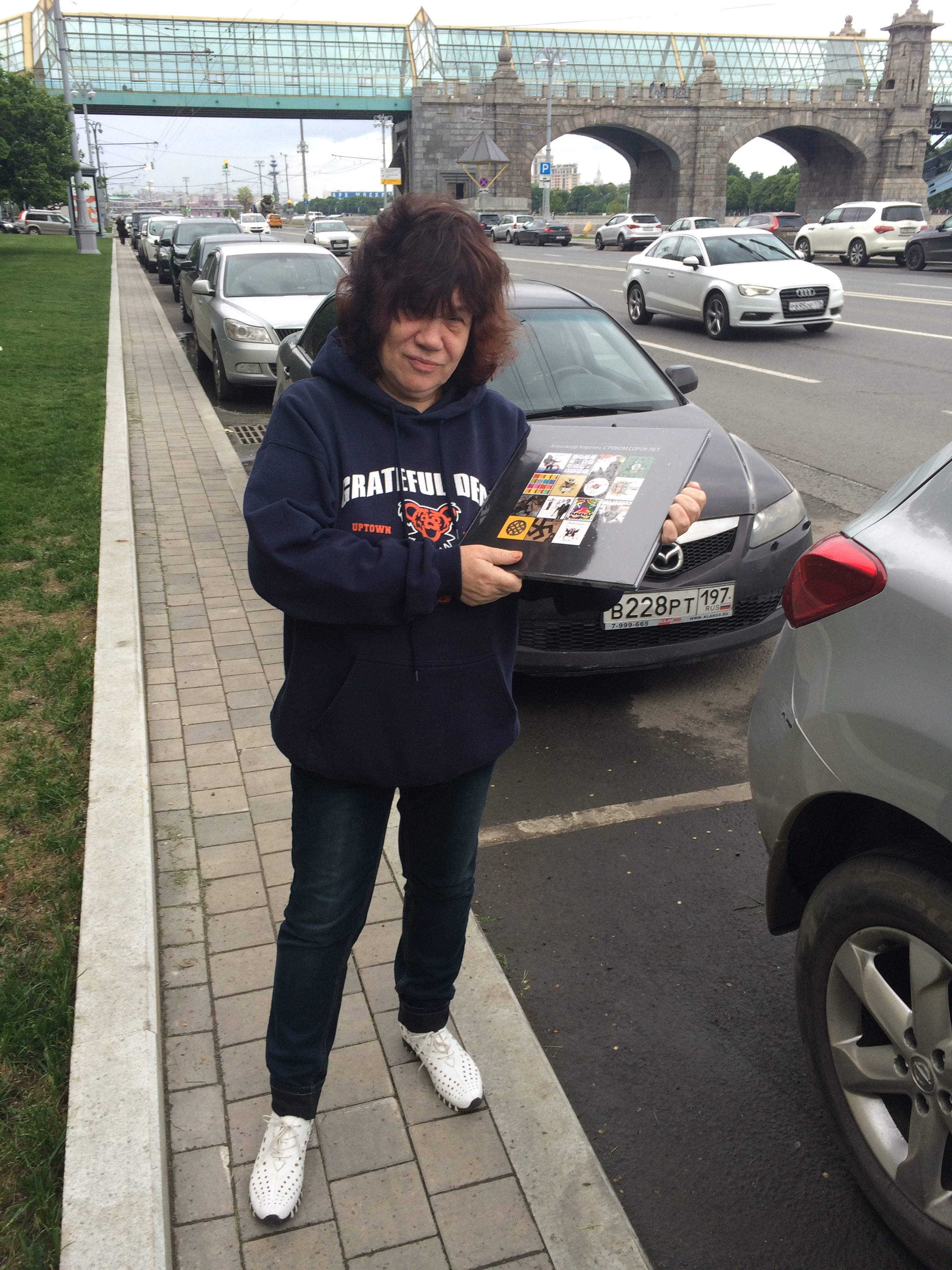 Пушкина Маргарита Анатольевна поэт, издатель